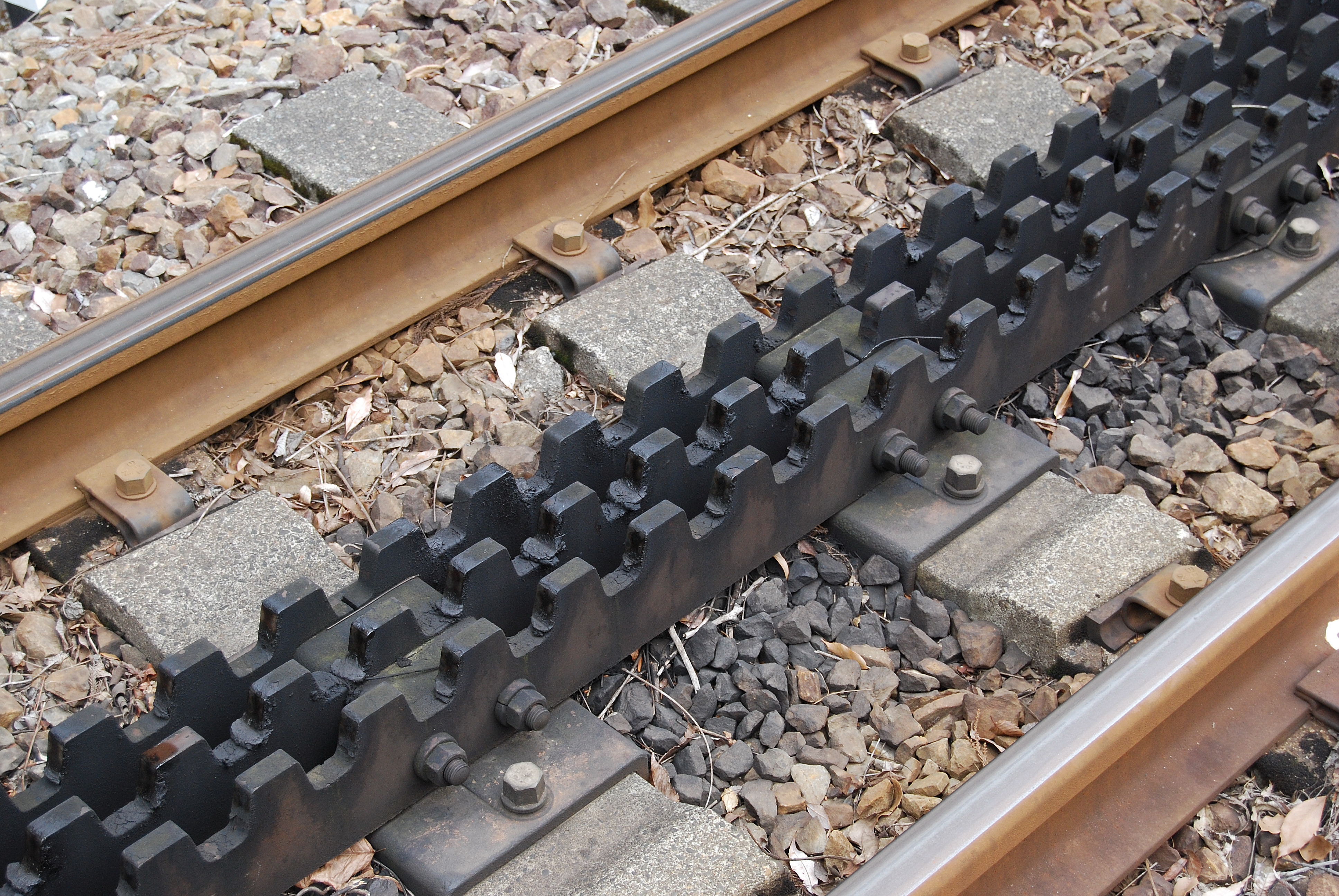 大井川鐵道井川線のアプトいちしろ-長島ダム駅間にある3組のラックレール。